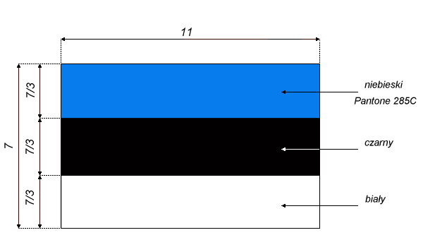 Flaga Estonii z naniesionymi wymiarami i kolorystyka